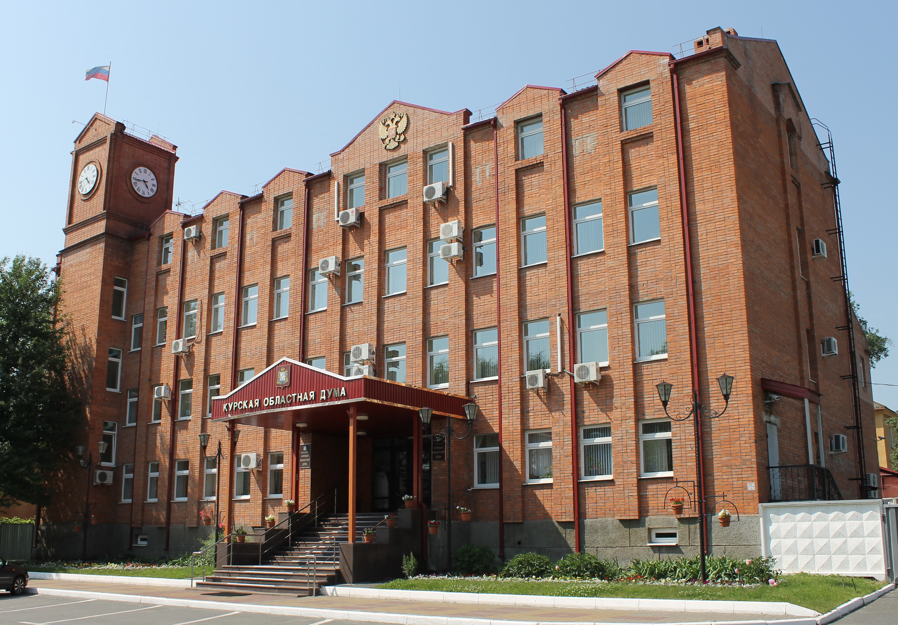 Здание Курской областной думы